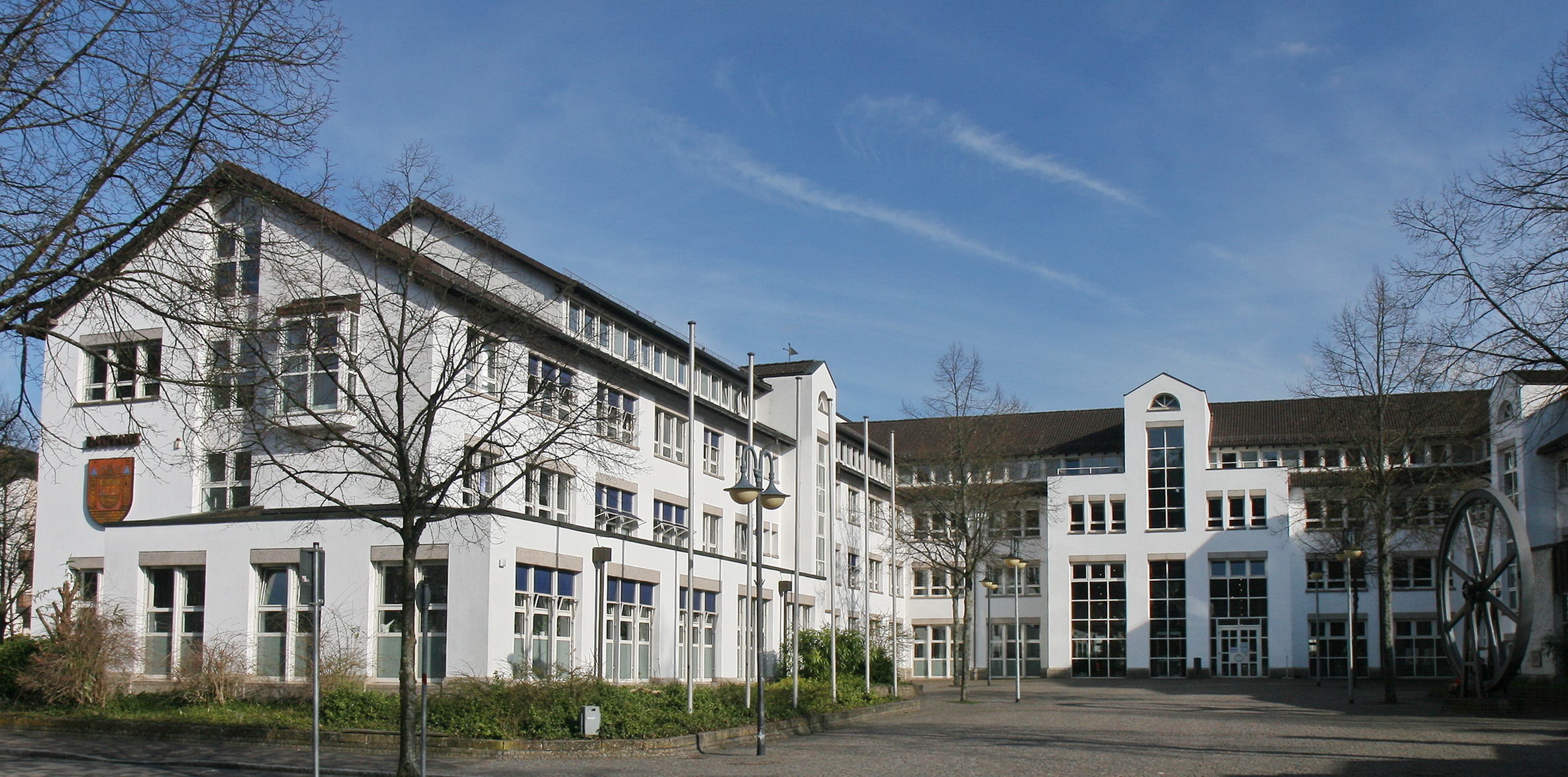 Rathaus, Grünestraße 12 in Plettenberg.